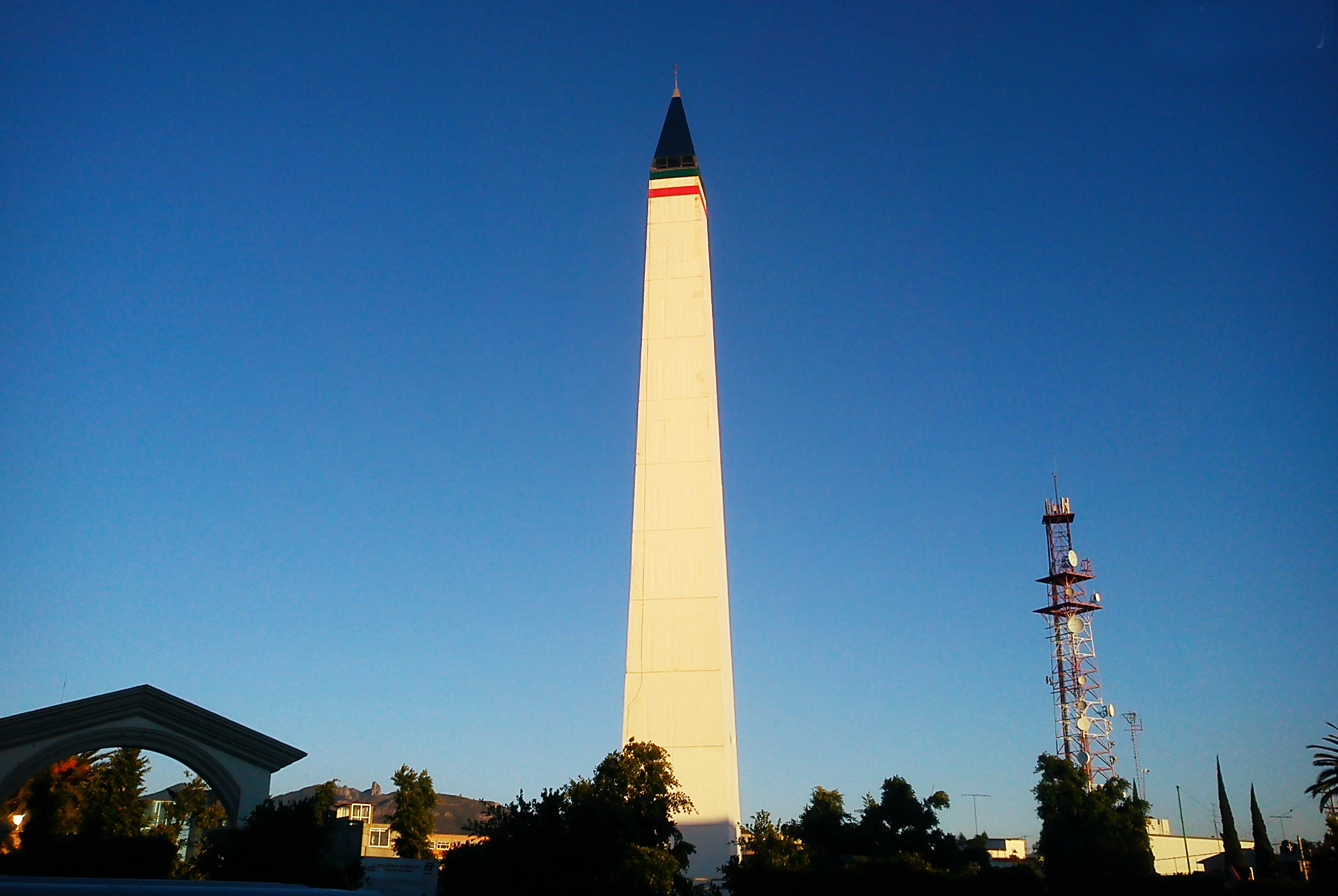 Obelisco que conmemora el Bicentenario de la Independencia de México y el Centenario de la Revolución Mexicana.